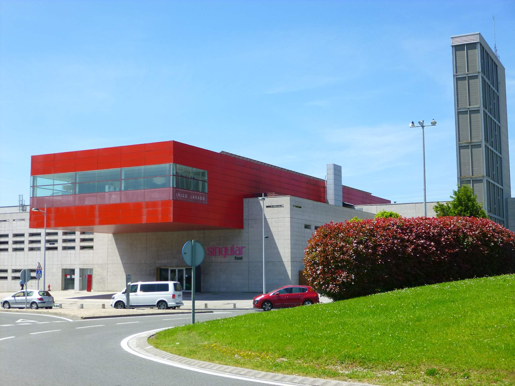 Feria Internacional de la Costa Vasca (FICOBA), en Irún (Gipuzkoa)